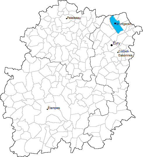 Carte de localisation du canton de Montgeron en Essonne (91)